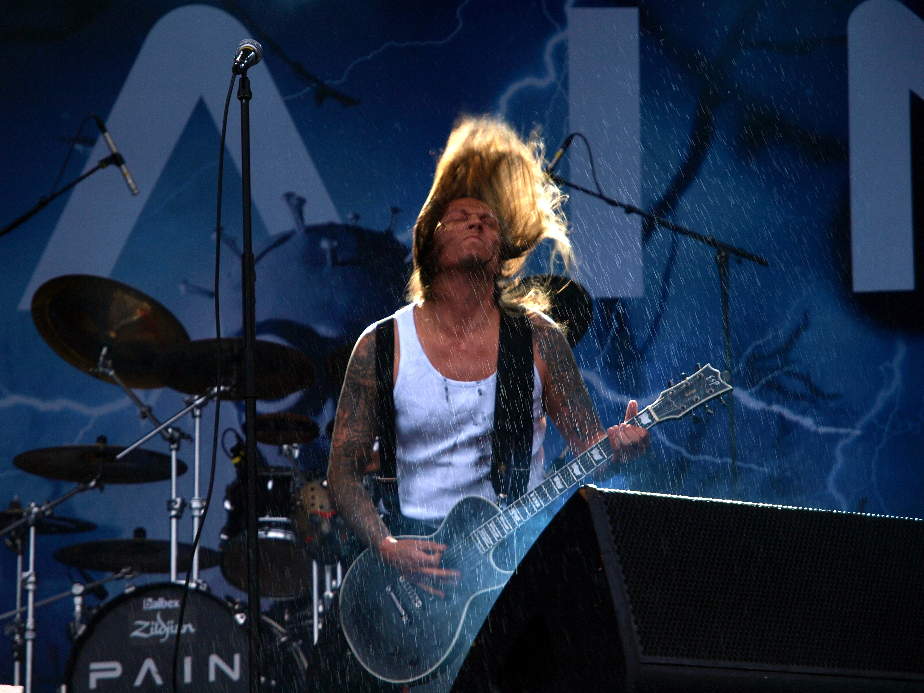 Peter Tägtgren mit der Band Pain live am Myötätuulirock 2011